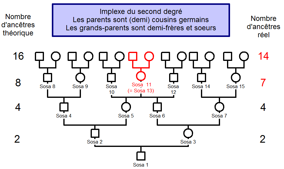 Implexe avec 7 AGP / 8